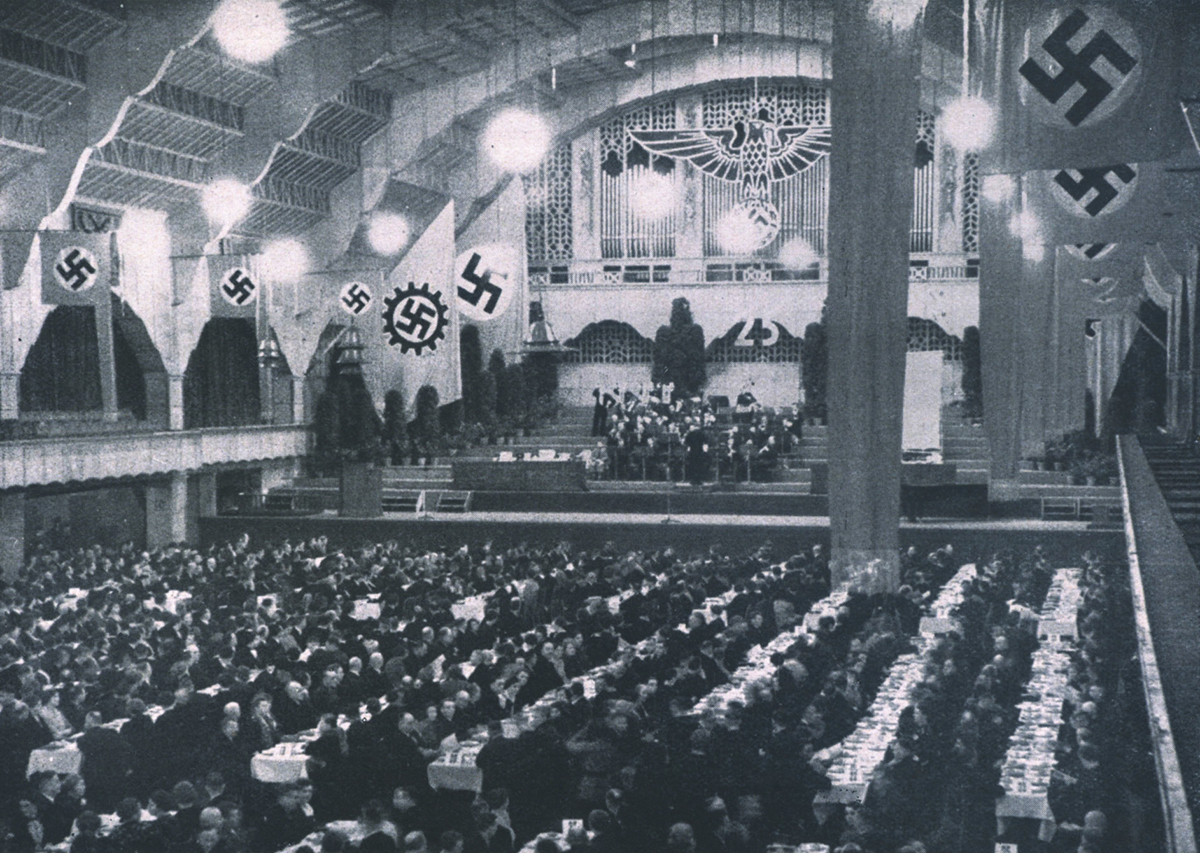 Jubilarsfest Aktien-Gesellschaft für Stickstoffdünger in Knapsack - heute Chemiepark Knapsack, Huerth, Germany